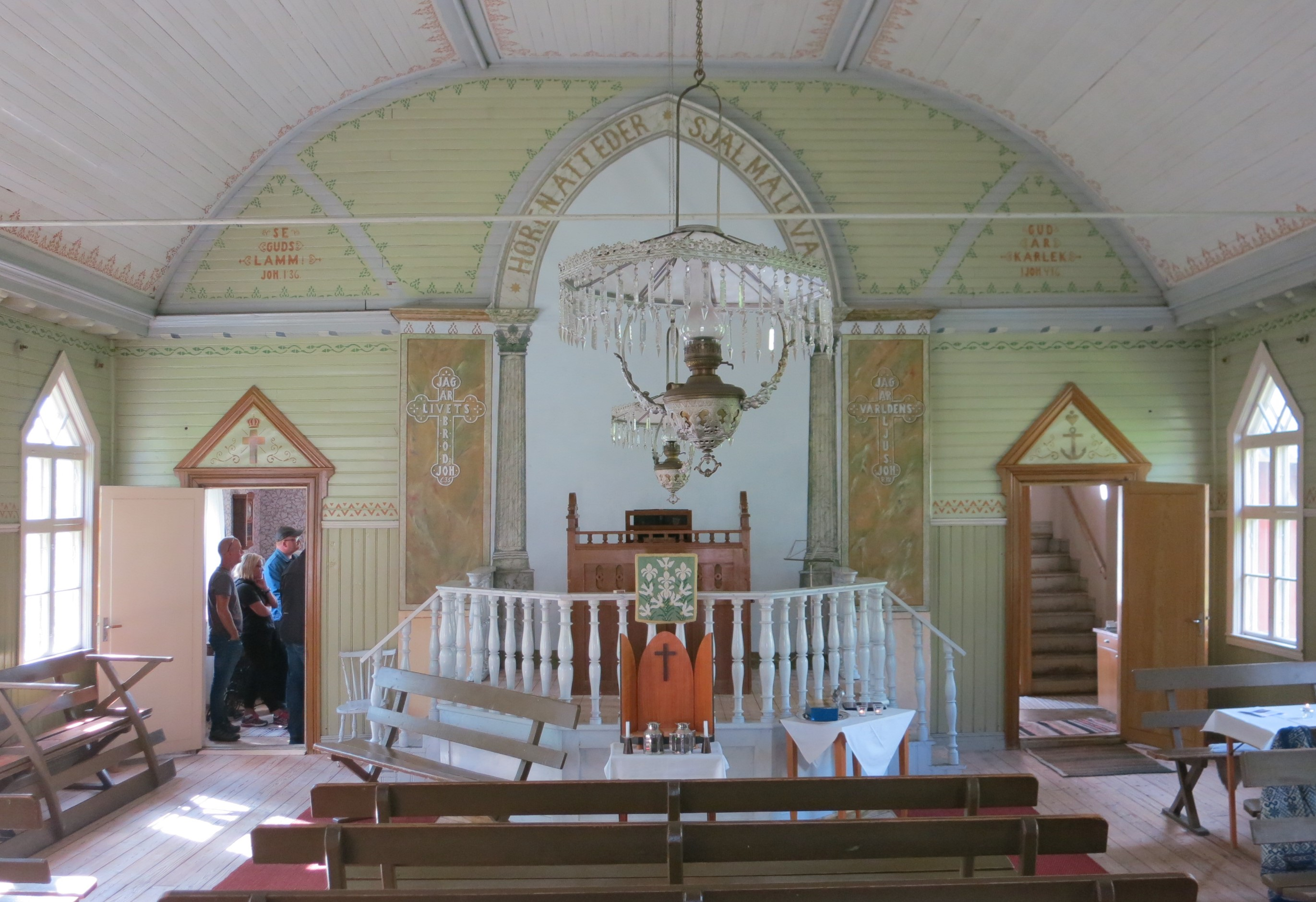 Missionshuset i Rydöbruk, Hylte kommun, Halland